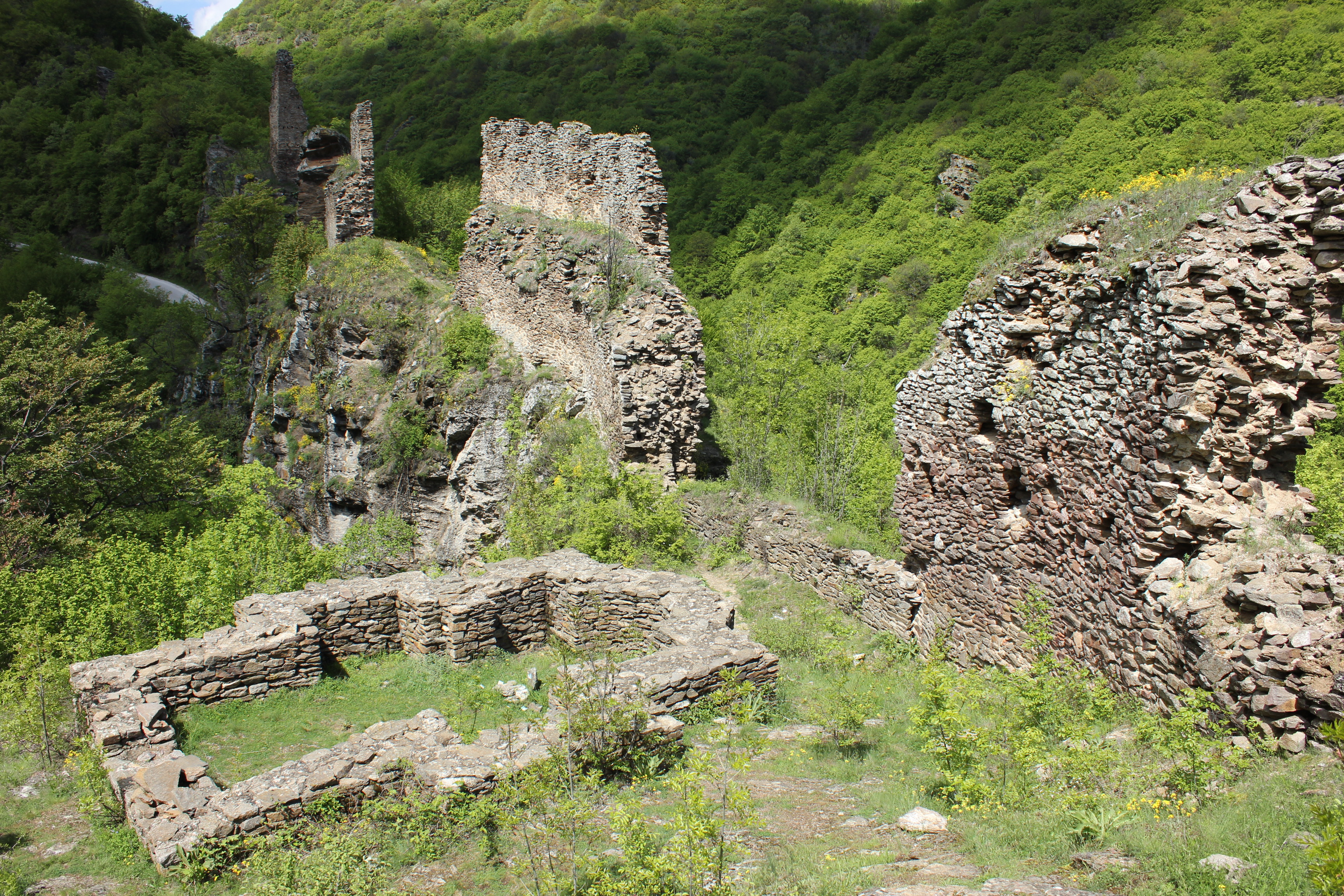 Общ изглед от вътрешността на крепостта Марково кале, Враня, Сърбия. Вижда се северната част от източната крепостта стена и основи на църква.